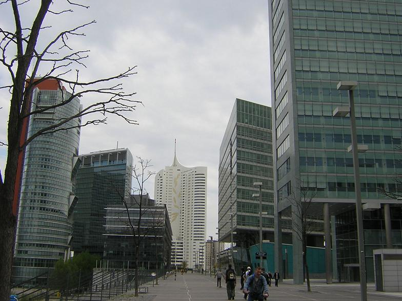 Део Бечког интернационалног центра, 2008. година.